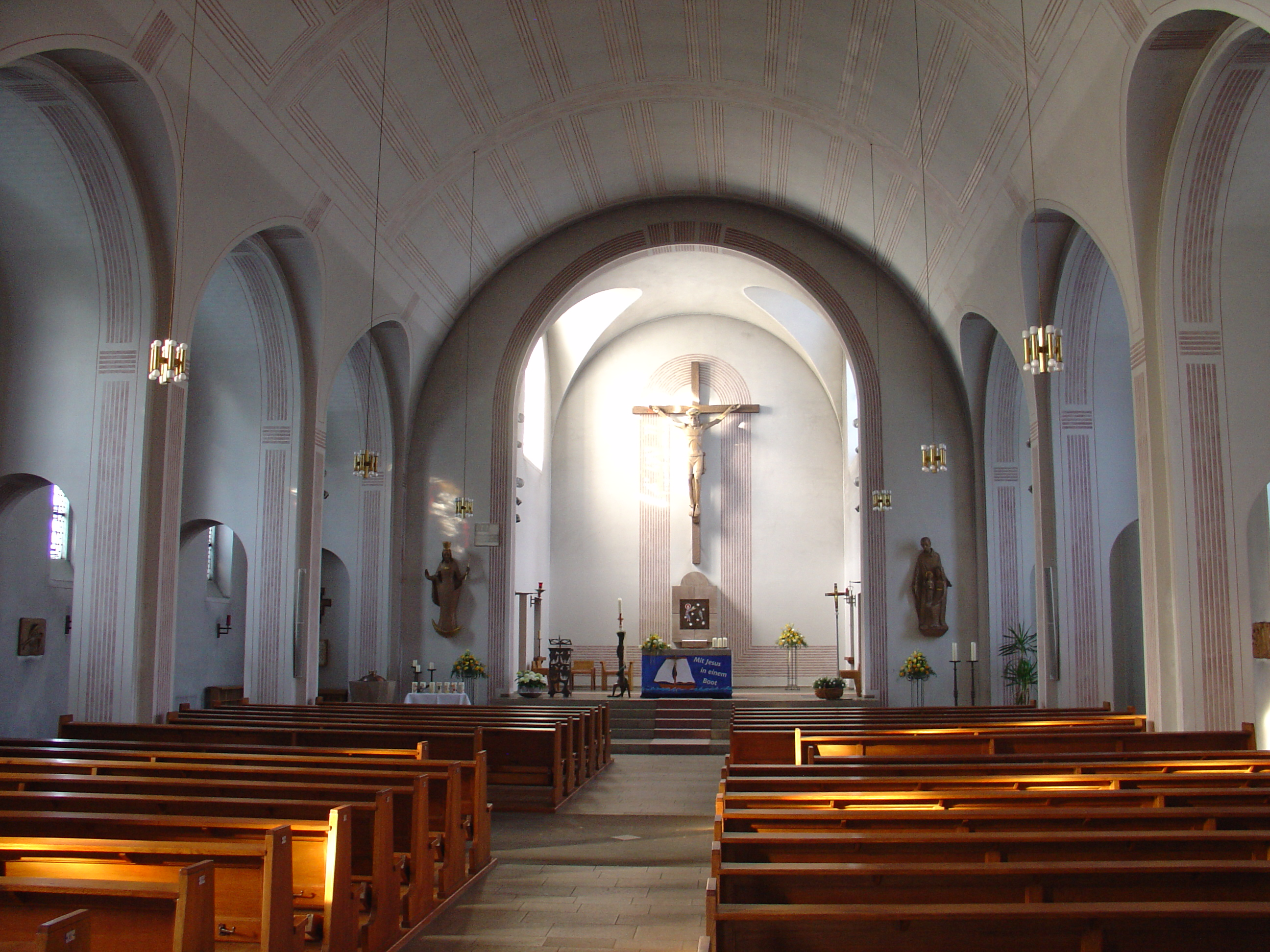 Altarraum der kath. St. Marien Kirche in Paderborn-Sande